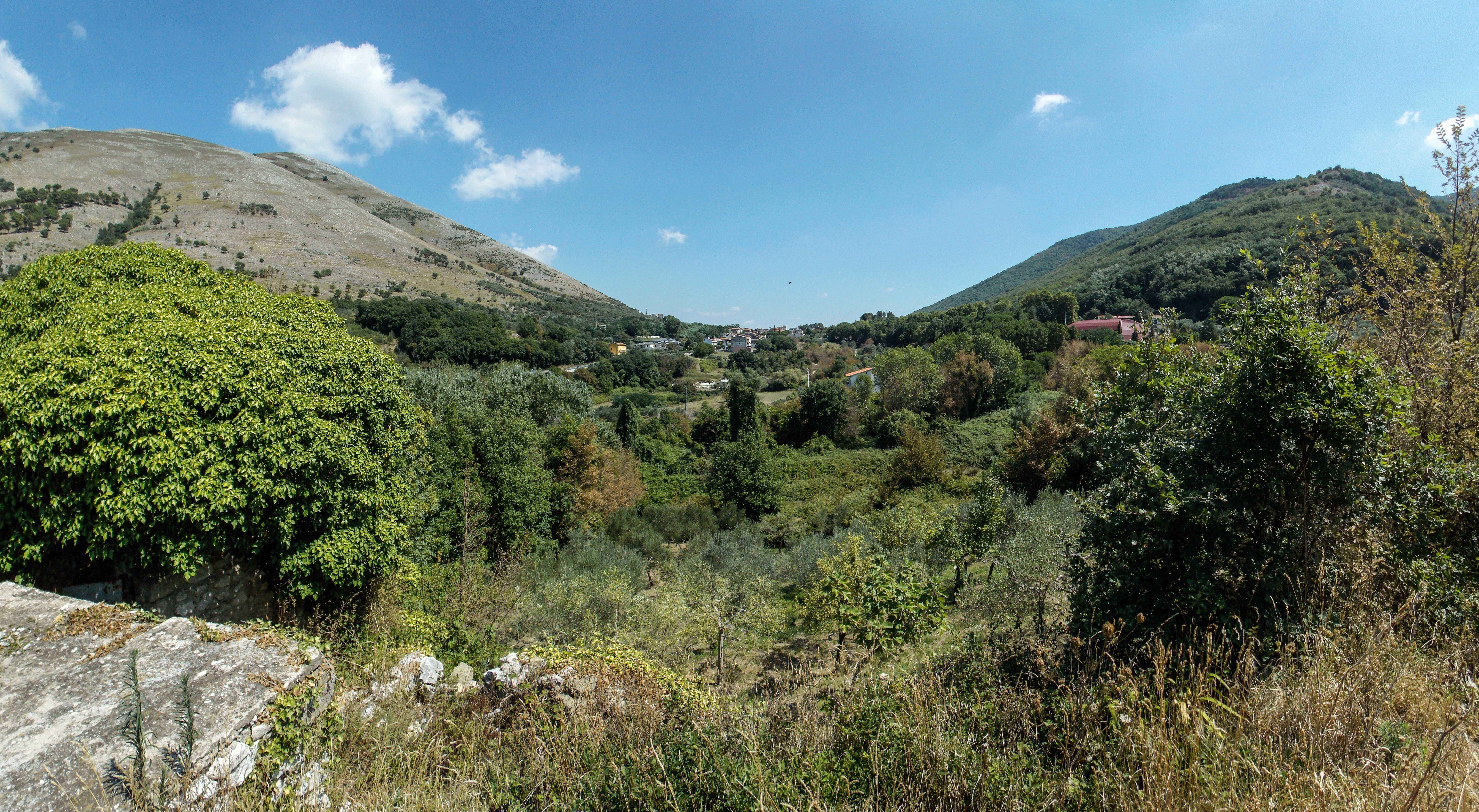 La Stretta di Arpaia, vista dai dintorni di Forchia, in provincia di Benevento. Viene comunemente identificata con il luogo delle Forche Caudine.